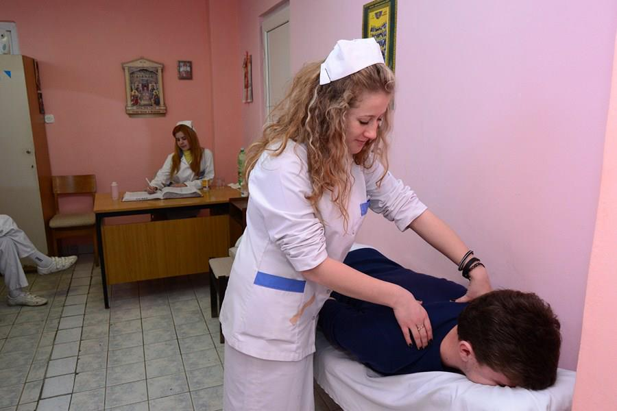 Физиотерапевтски техничар